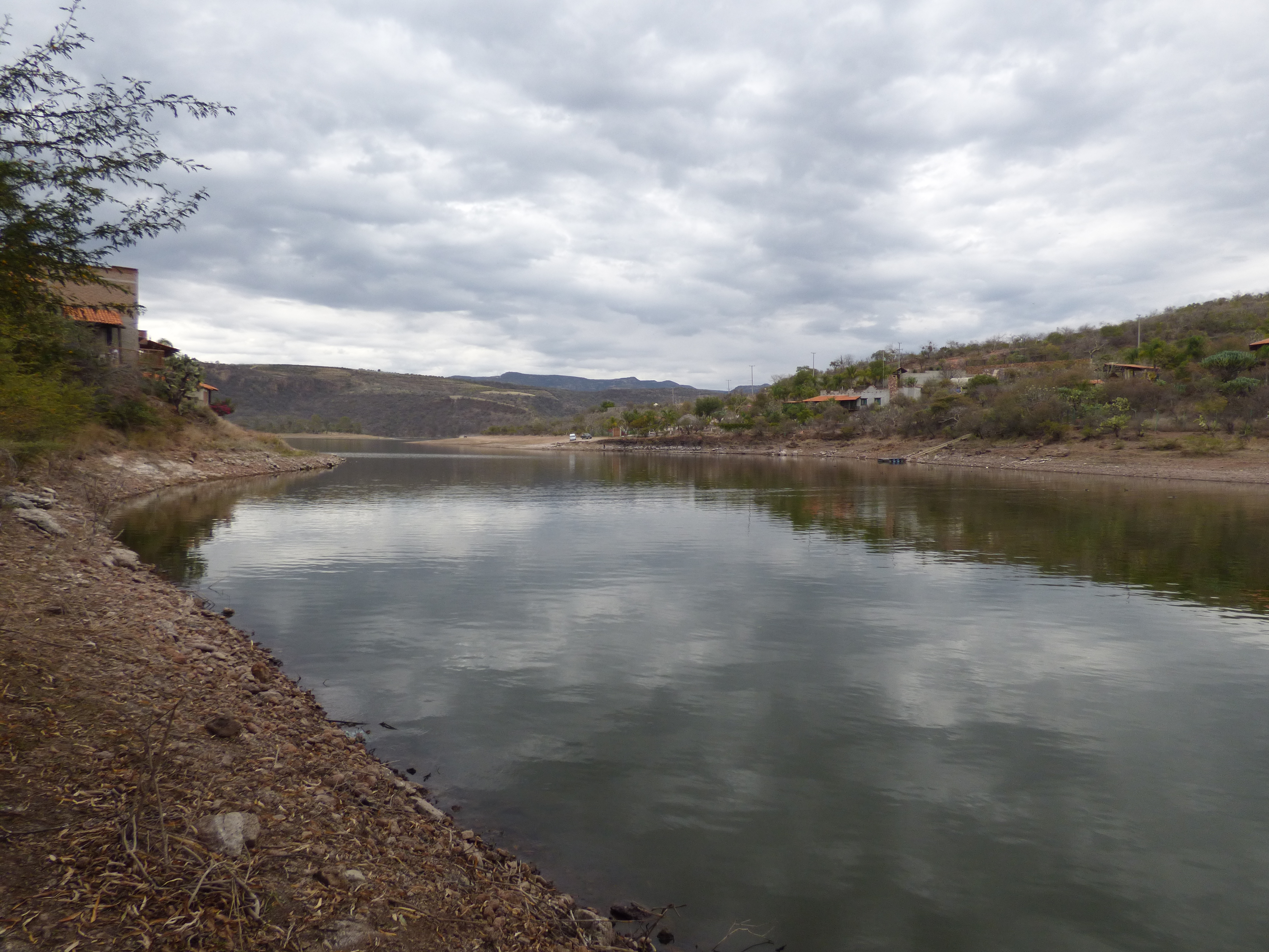 Presa de Malpaso, Calvillo, Aguascalientes